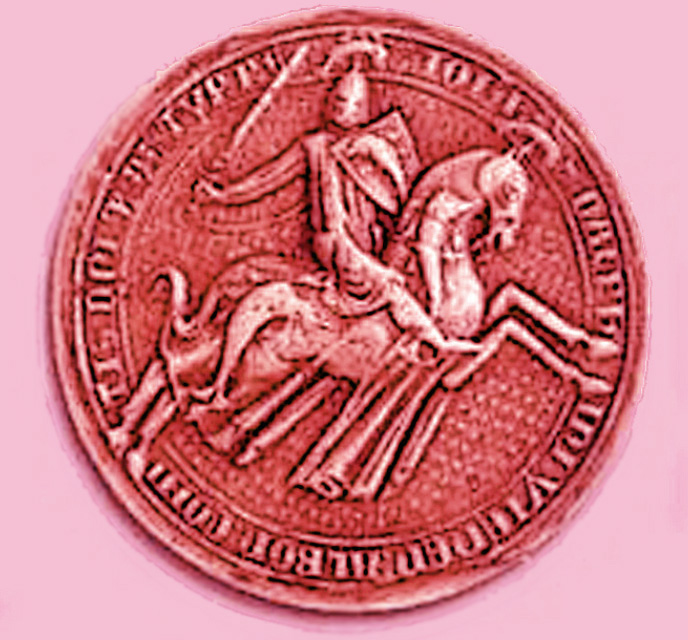 Grand sceau de Jean II de Viennois